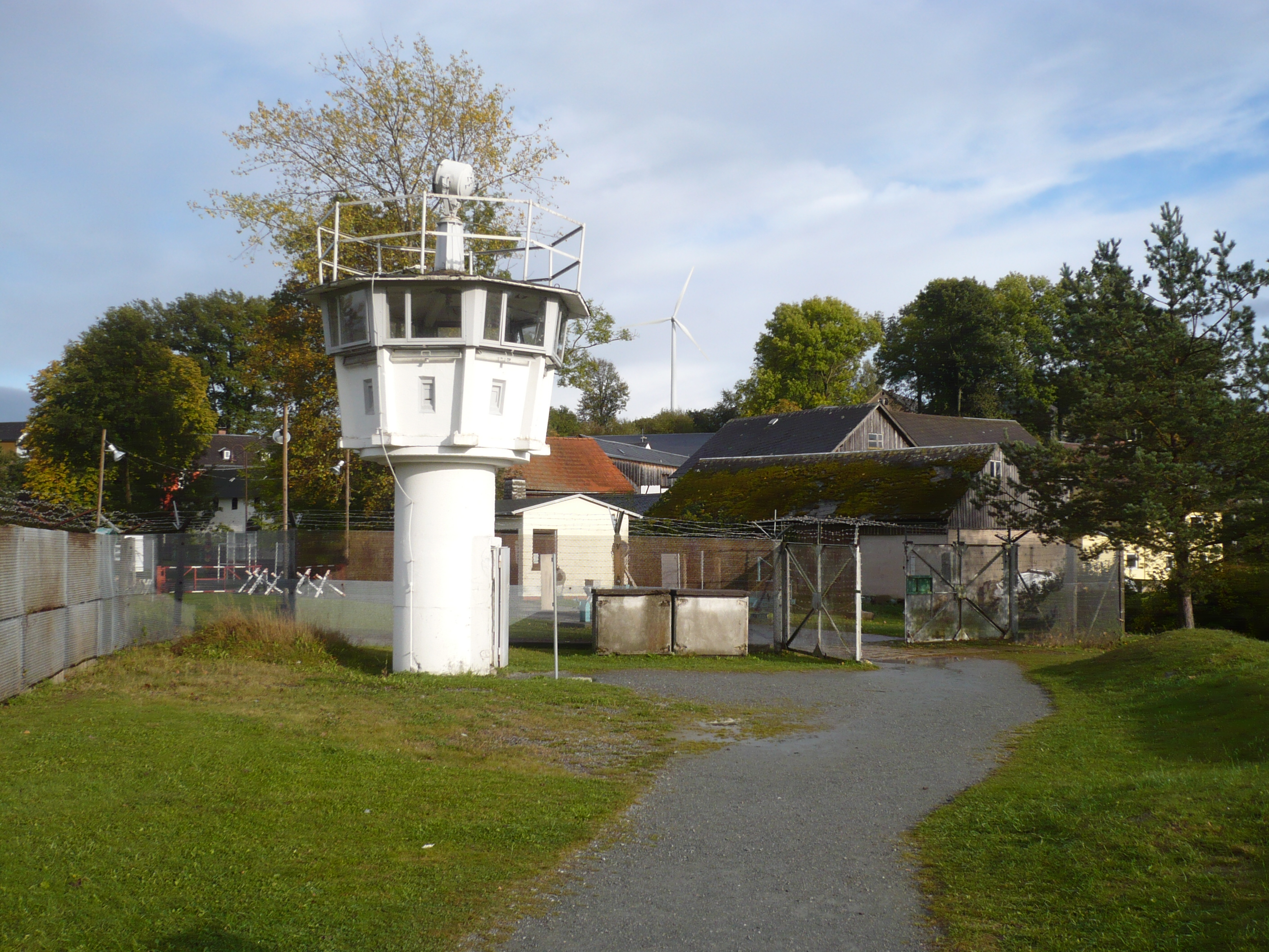 Grenzlandmuseum Mödlareuth